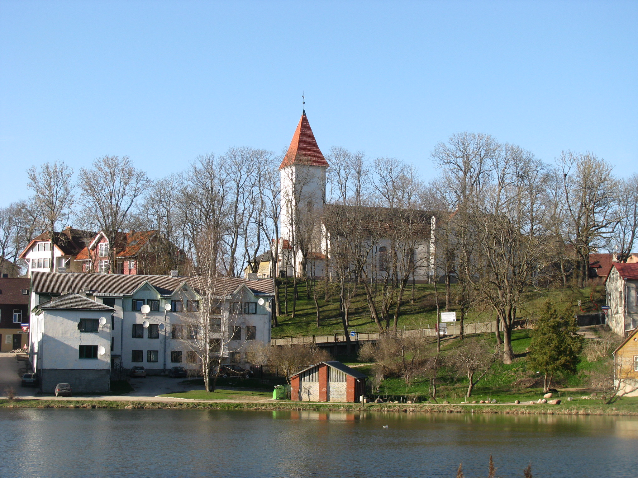 Talsu luterāņu baznīca